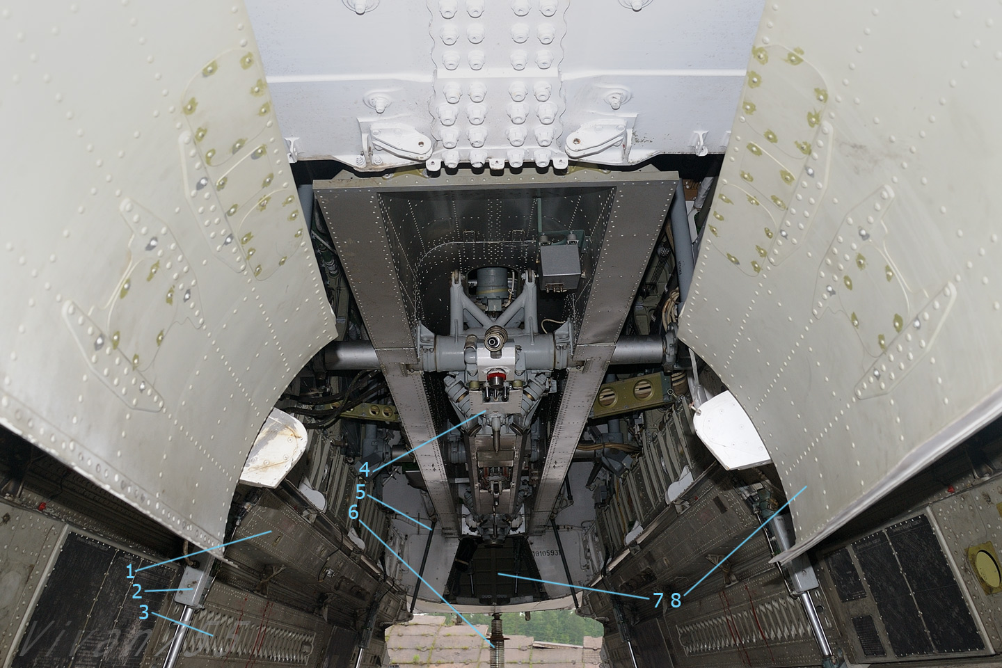 Бомболюк самолёта Ту-22М3. 4 — балочный держатель, 6 — хвостовой гидроподъёмник (наземное оборудование), 7 — отсек тормозного парашюта.